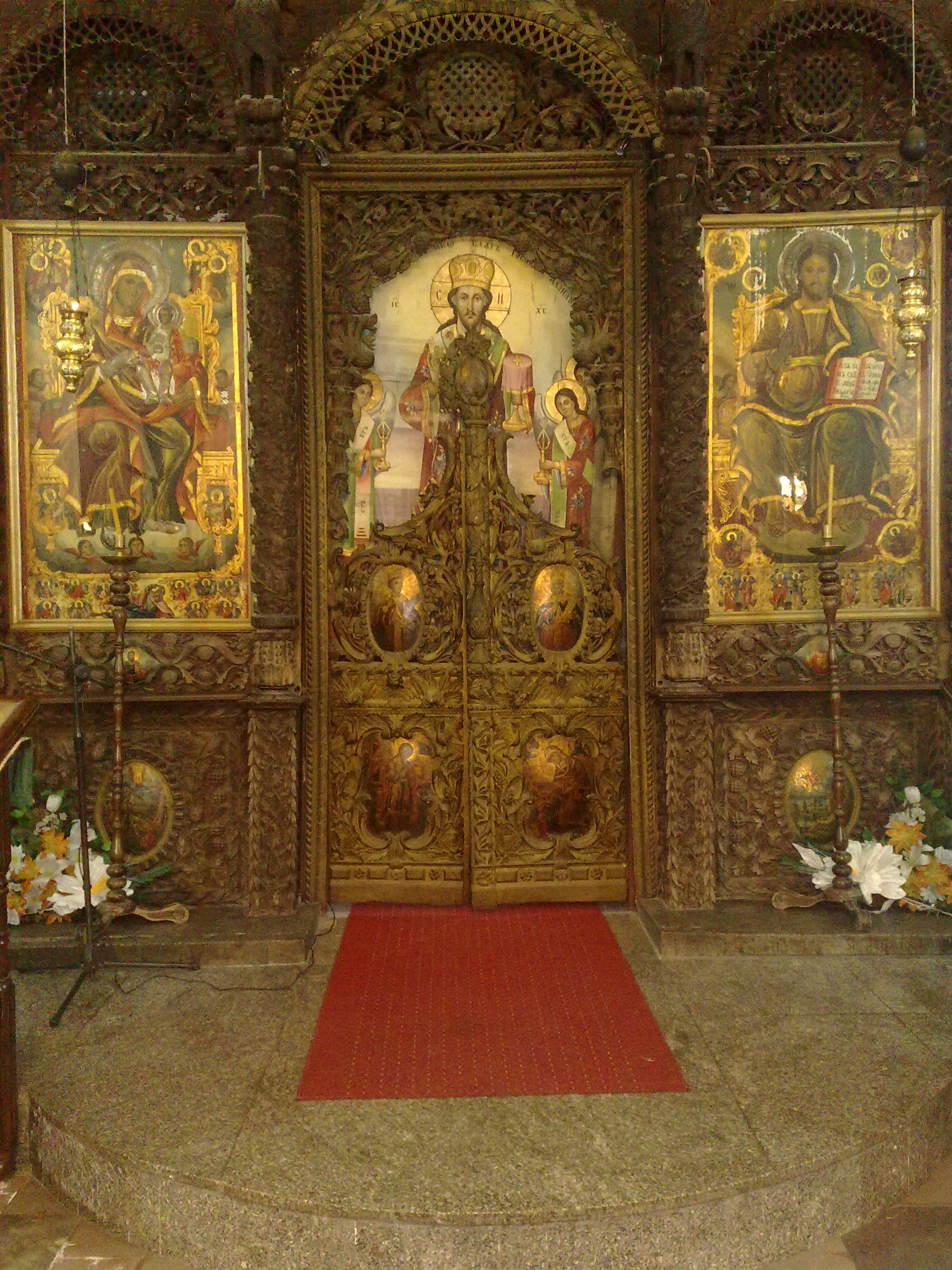 Царските двери од иконостасот во црквата "Св. Благовештение", Прилеп.